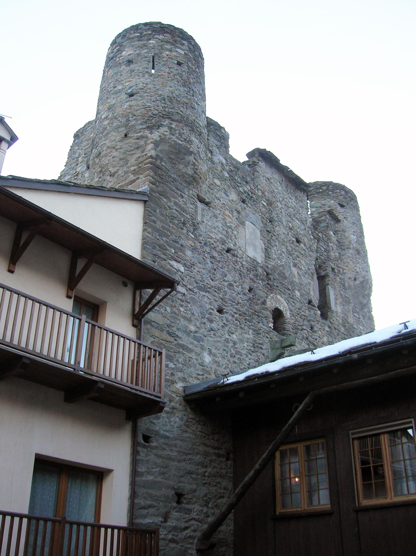 Retro del Castello di Pilato, a Nus, Valle d'Aosta, Italia. Si notano le due torri.